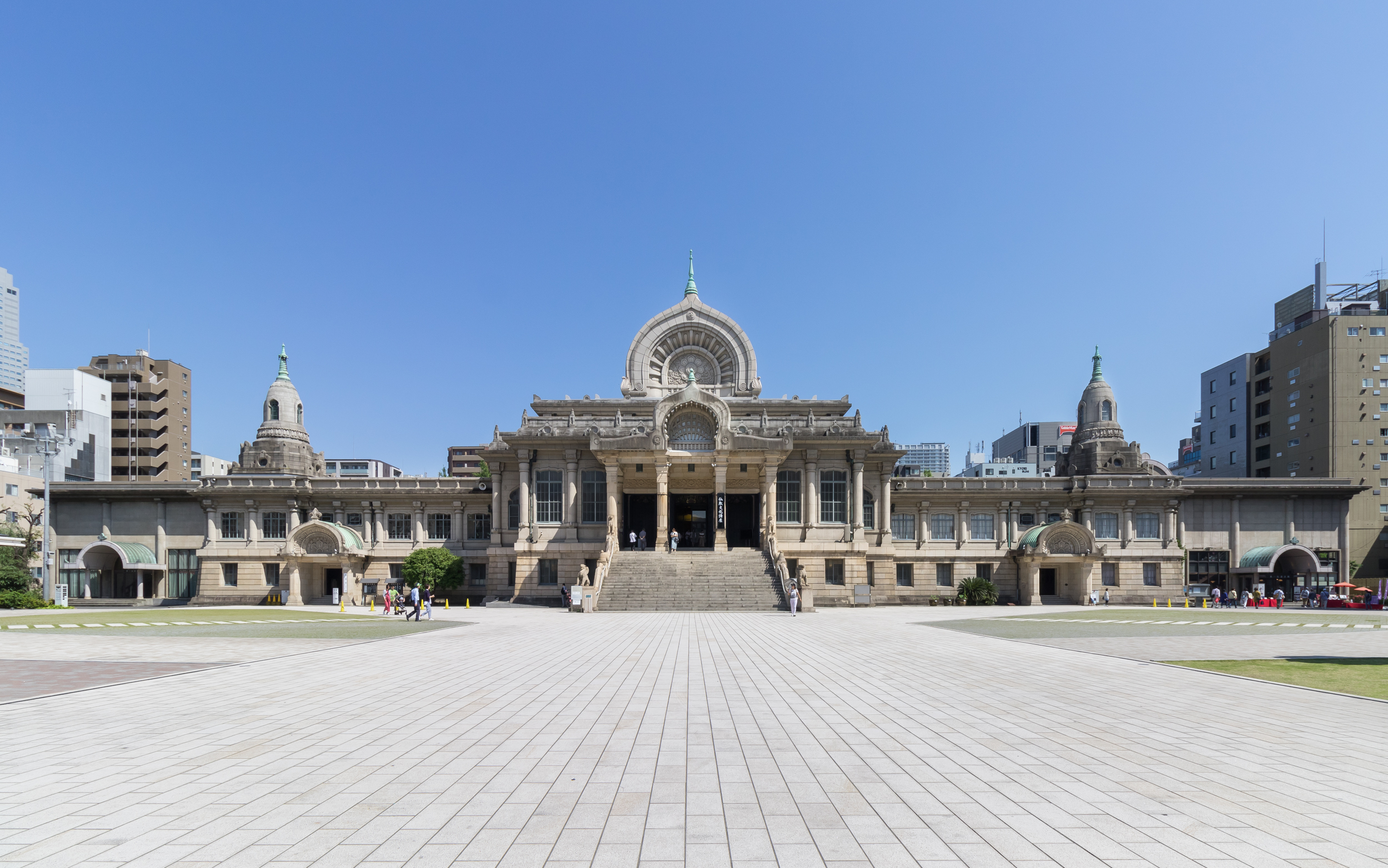 築地本願寺、東京都中央区、伊東忠太設計。